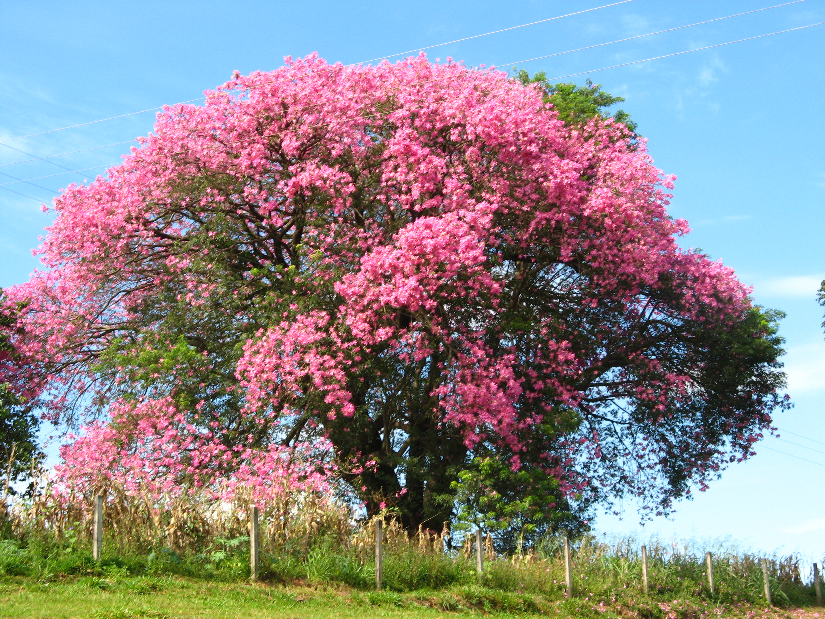 paineira em mogi mirim , sao paulo, brazil